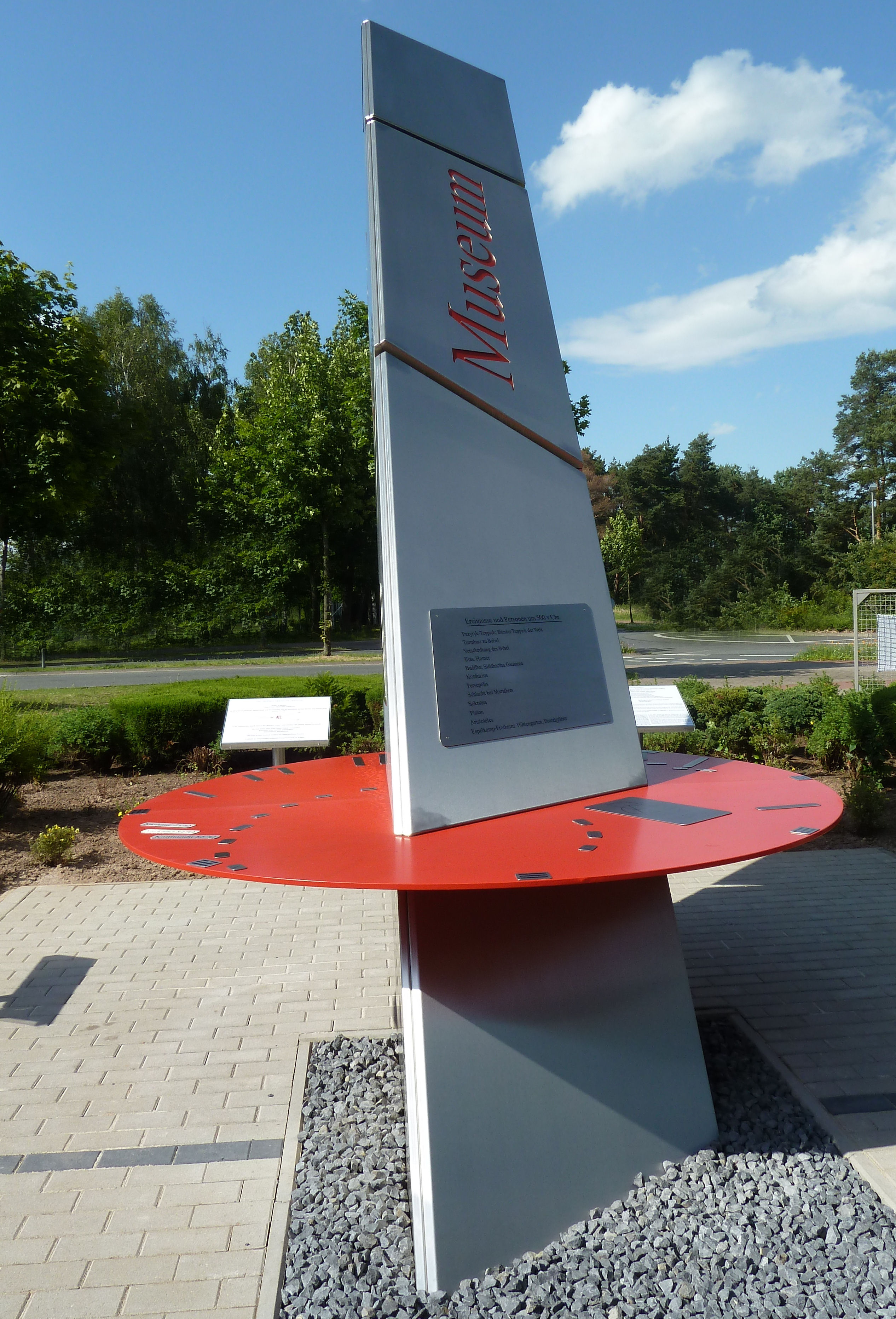 Heliochronometer des Teppichmuseums Tönsmann - gestaltet nach dem goldenen Schnitt